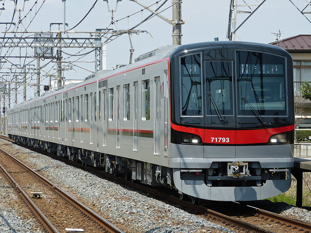 東武鉄道70090型車両。姫宮駅にて。